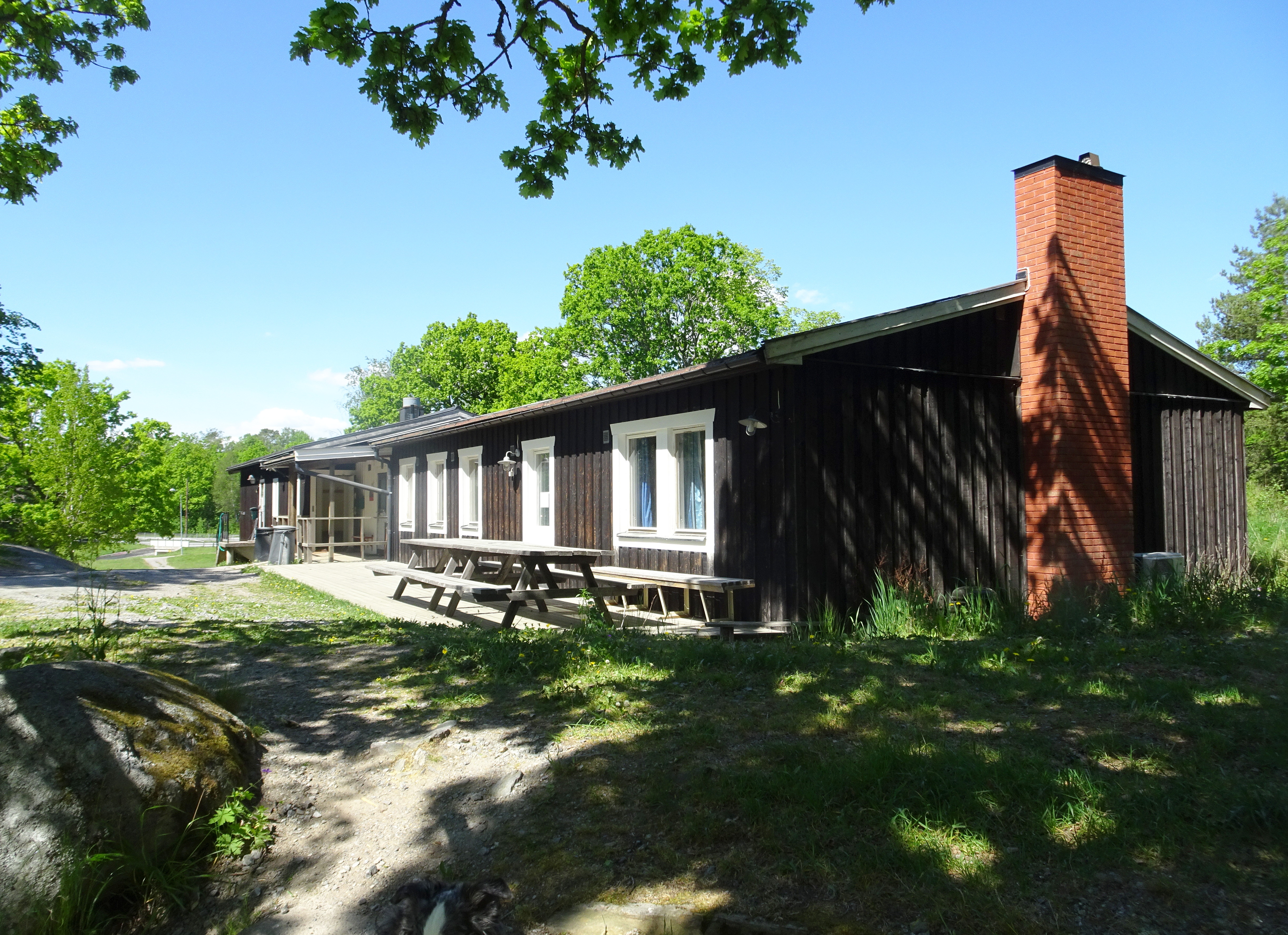 Hellasgården, Tennis